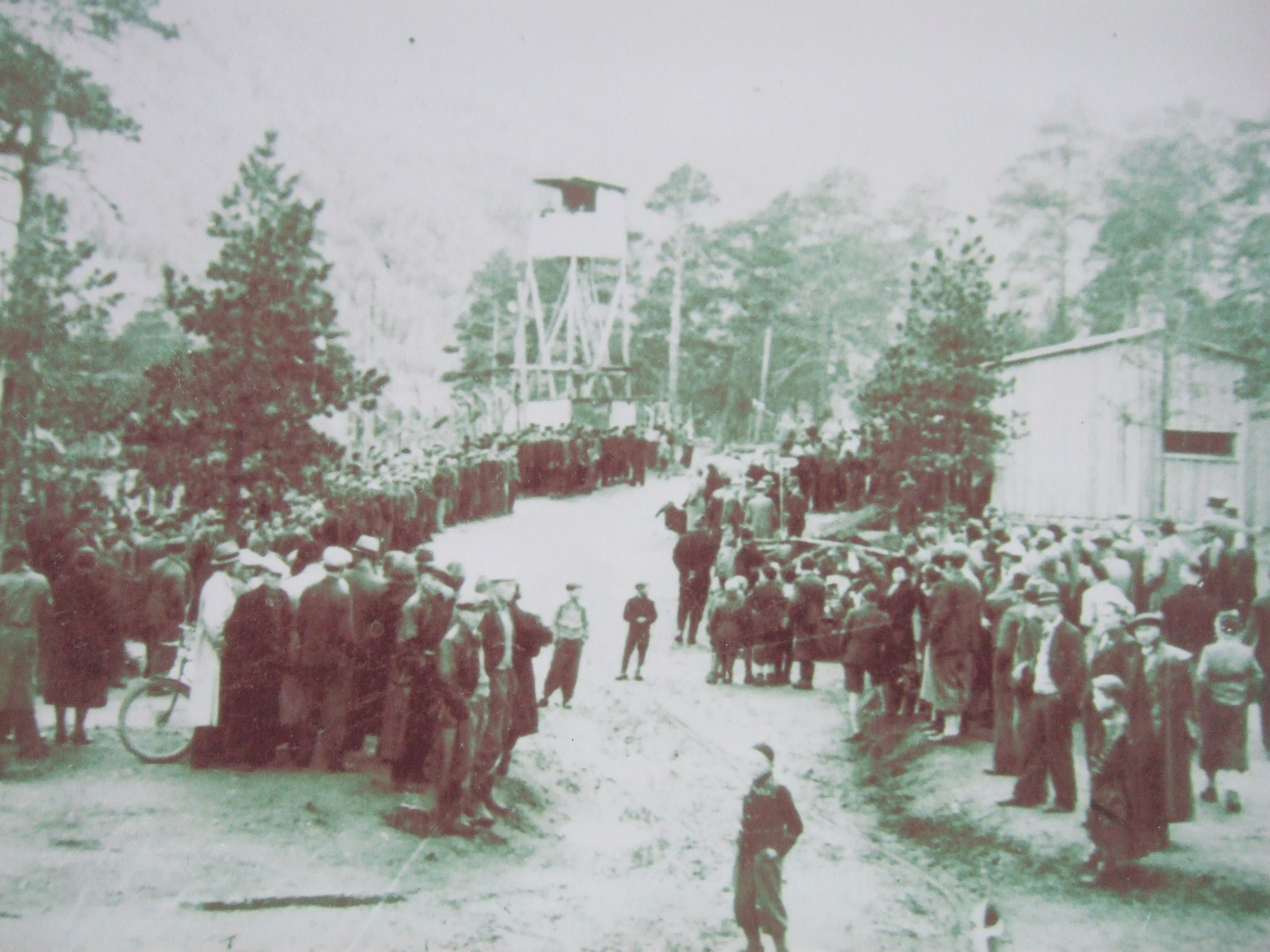 In may/june 1945 the POW camp in Botn, Saltdal, Norway, was liberated. Lots of peoples from the village have come to see the camp when it was opened and the russian soldiers was released.